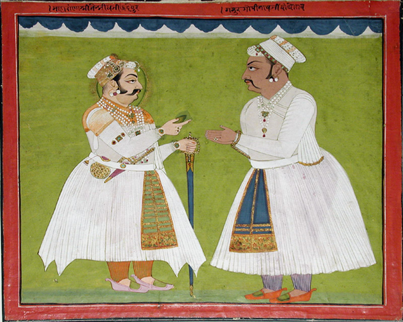 Maharana Jai Singh of Udaipur and Thakur Gopinath.